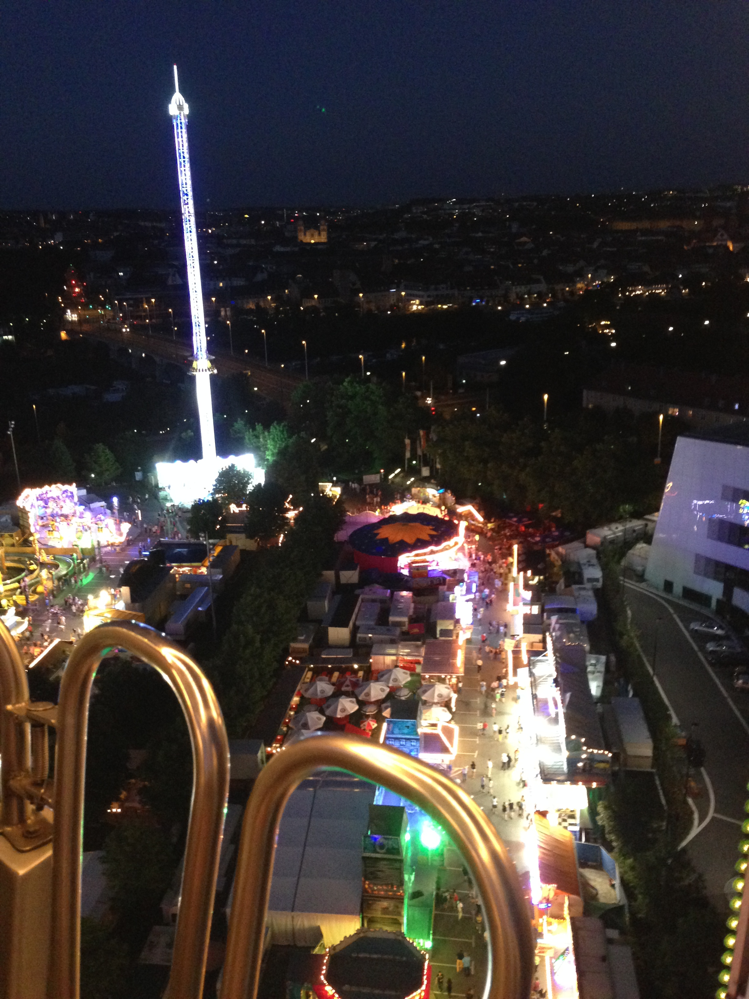 Kiliani-Volksfest in Würzburg